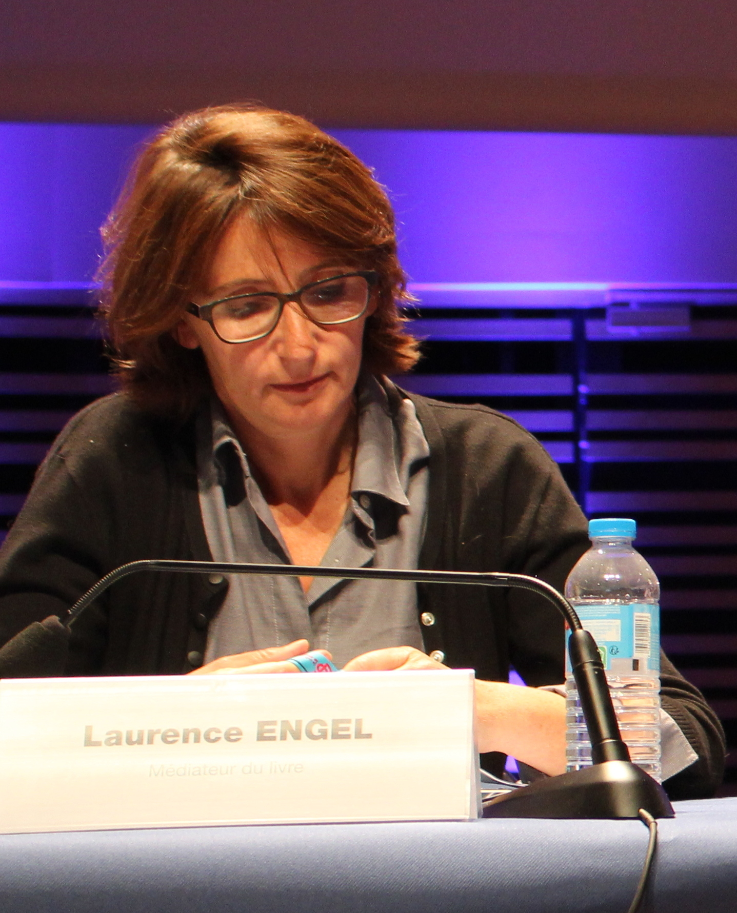 Laurence Engel - Rencontres nationales de la librairie 2015